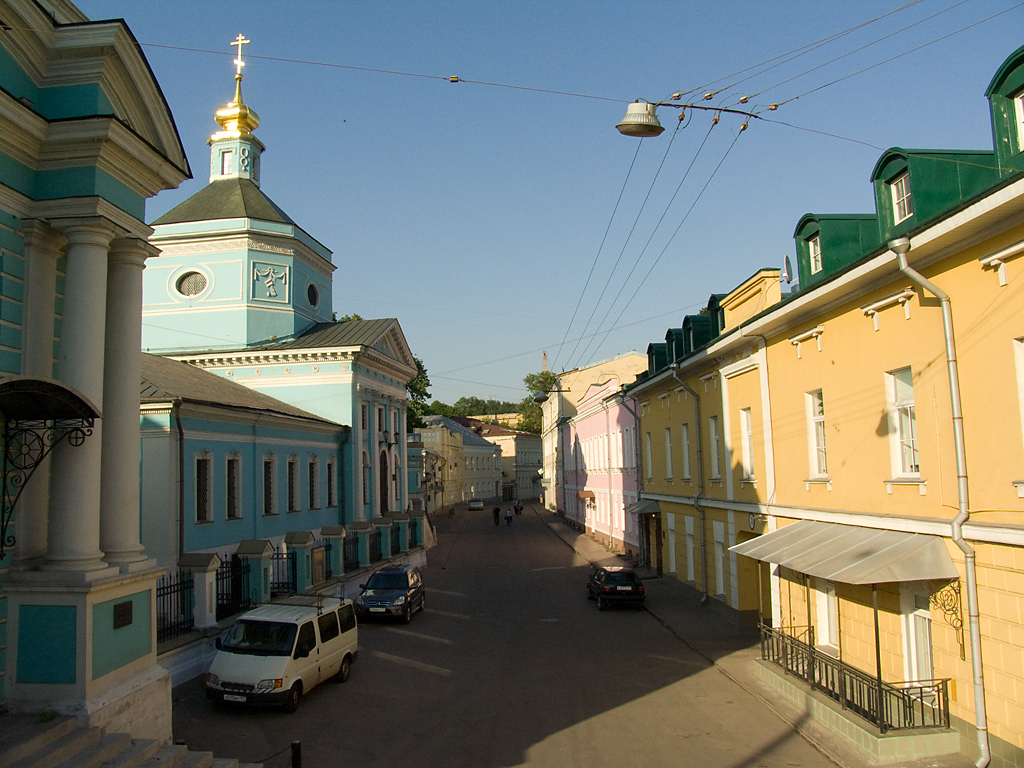 Serebryanishesky lane in Moscow, view north from Yauza Gates. Left: Trinity church by Karl Blank, 1764-1768 with additions made in 1781 and 1891Москва, Таганский район, вид с Яузских ворот в Серебрянический переулок. Слева - церковь Троицы в Серебряниках, 1764-1768, арх. Карл Бланк (последующие перестройки 1781 и 1891 гг.).